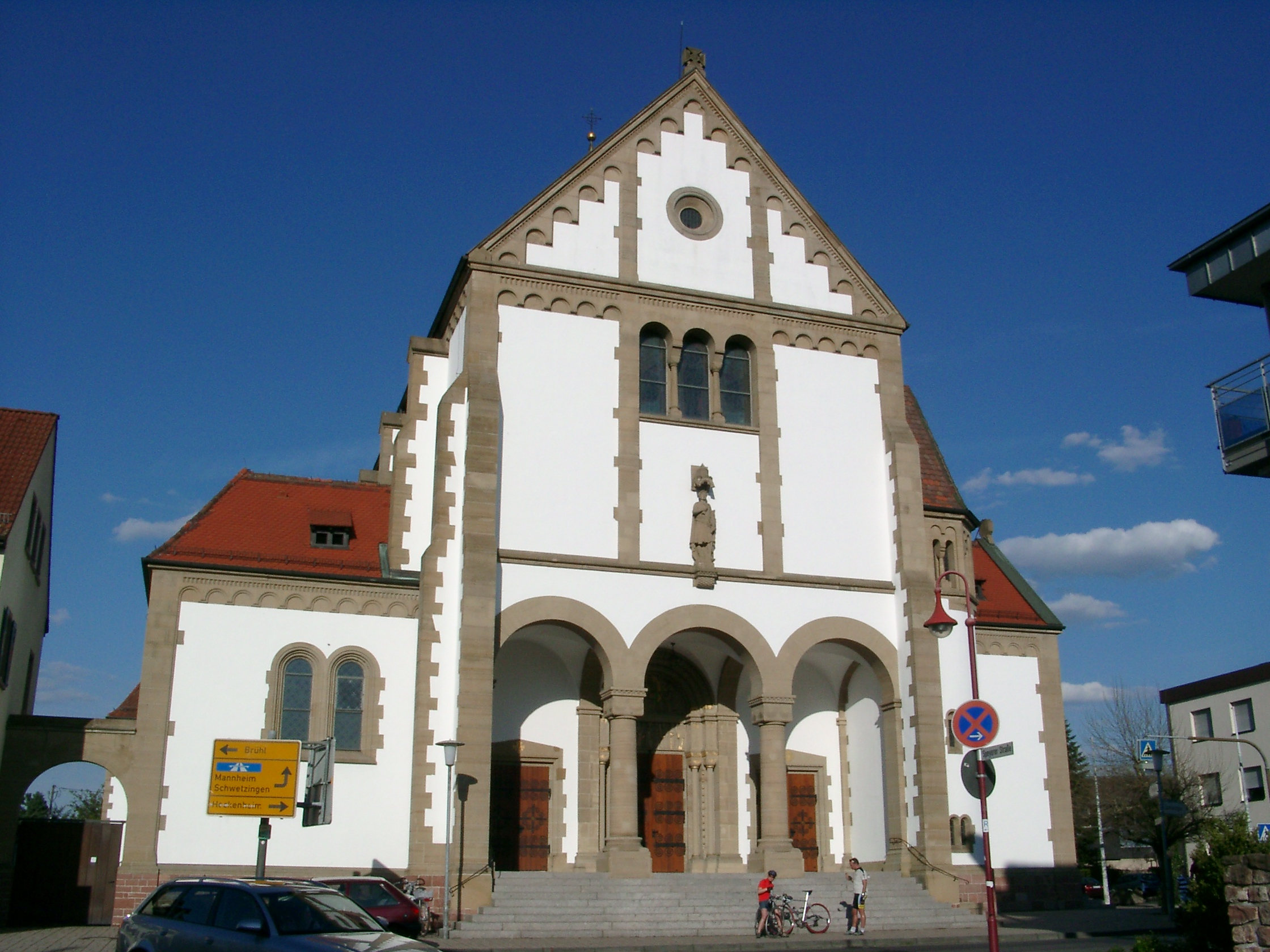 Ketsch, Katholische Kirche der Pfarrgemeinde St. Sebastian